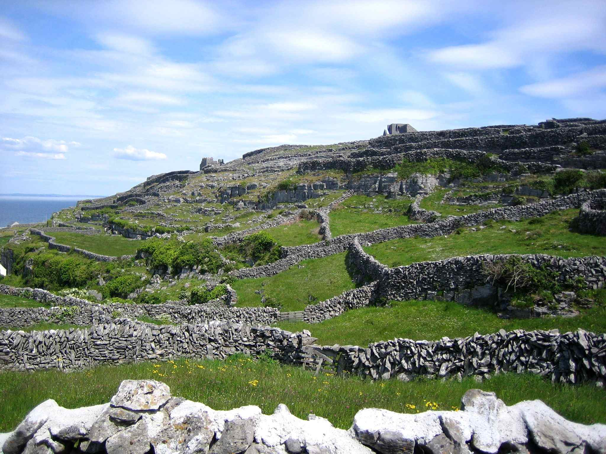 O'Briens Castle – Mittelalterliche Burg der O'Briens aus dem 15. Jahrhundert auf der Insel Inisheer, Aran Islands, Irland. Die Burgruine steht auf einem Hügel und wird von den Resten eines Ringforts umgeben. Im Vordergrund zahlreiche Steinmauern, die aus landwirtschaftlicher Nutzung resultieren.